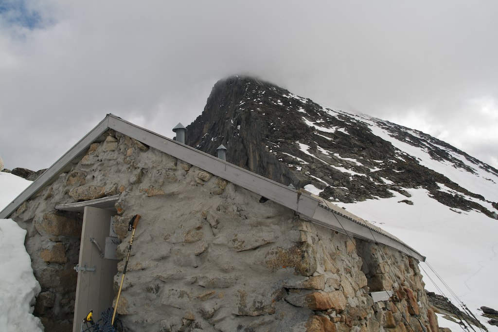 Skagastølsbu (1758 moh.), også kalt Hytta på Bandet, er en hytte som ligger ved foten av Storen, mellom Skagastølsbreen og Midtmaradalsbreen, i fjellområdet Hurrungane